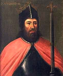 Imagem de Afonso III